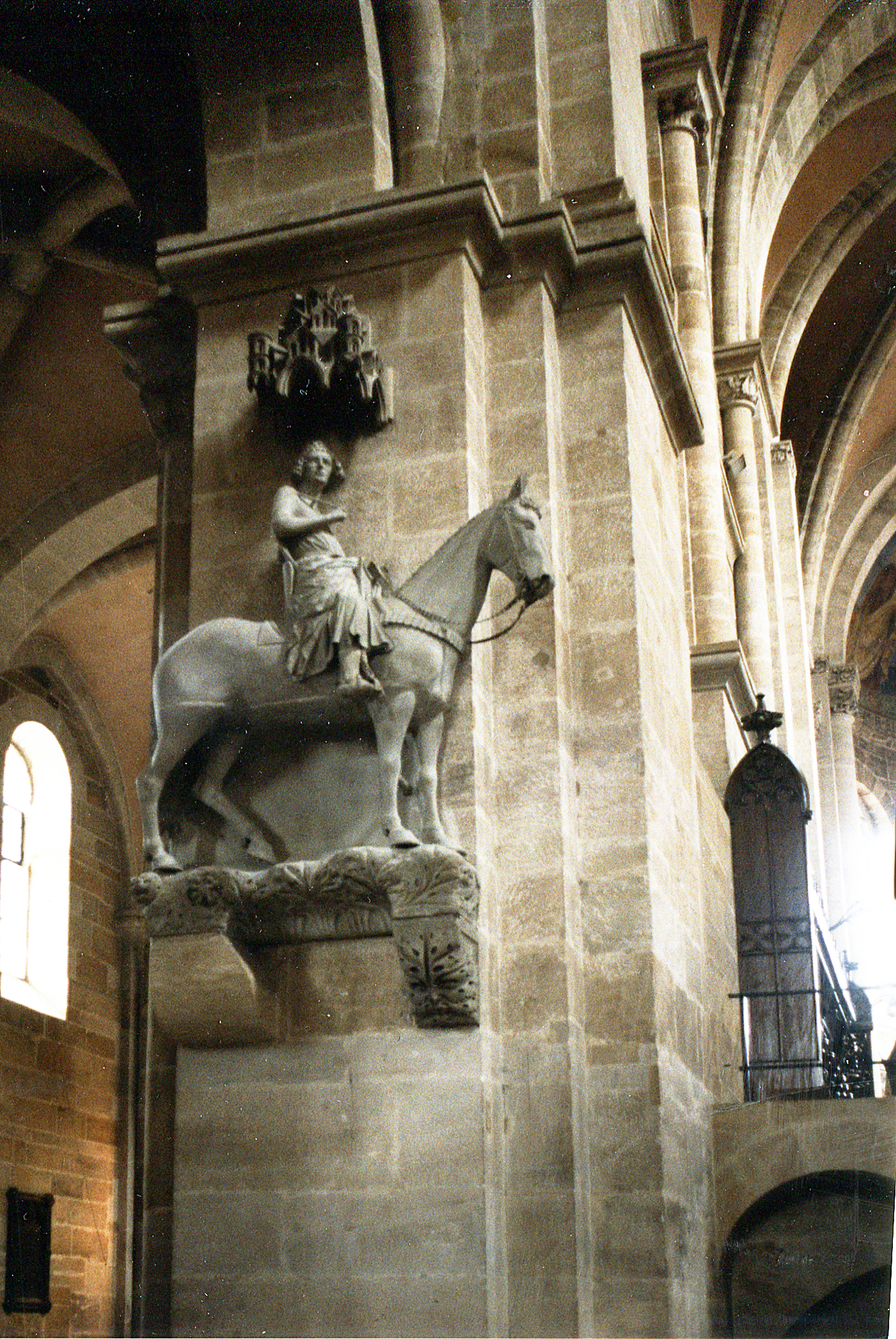 Бамбергский всадник.